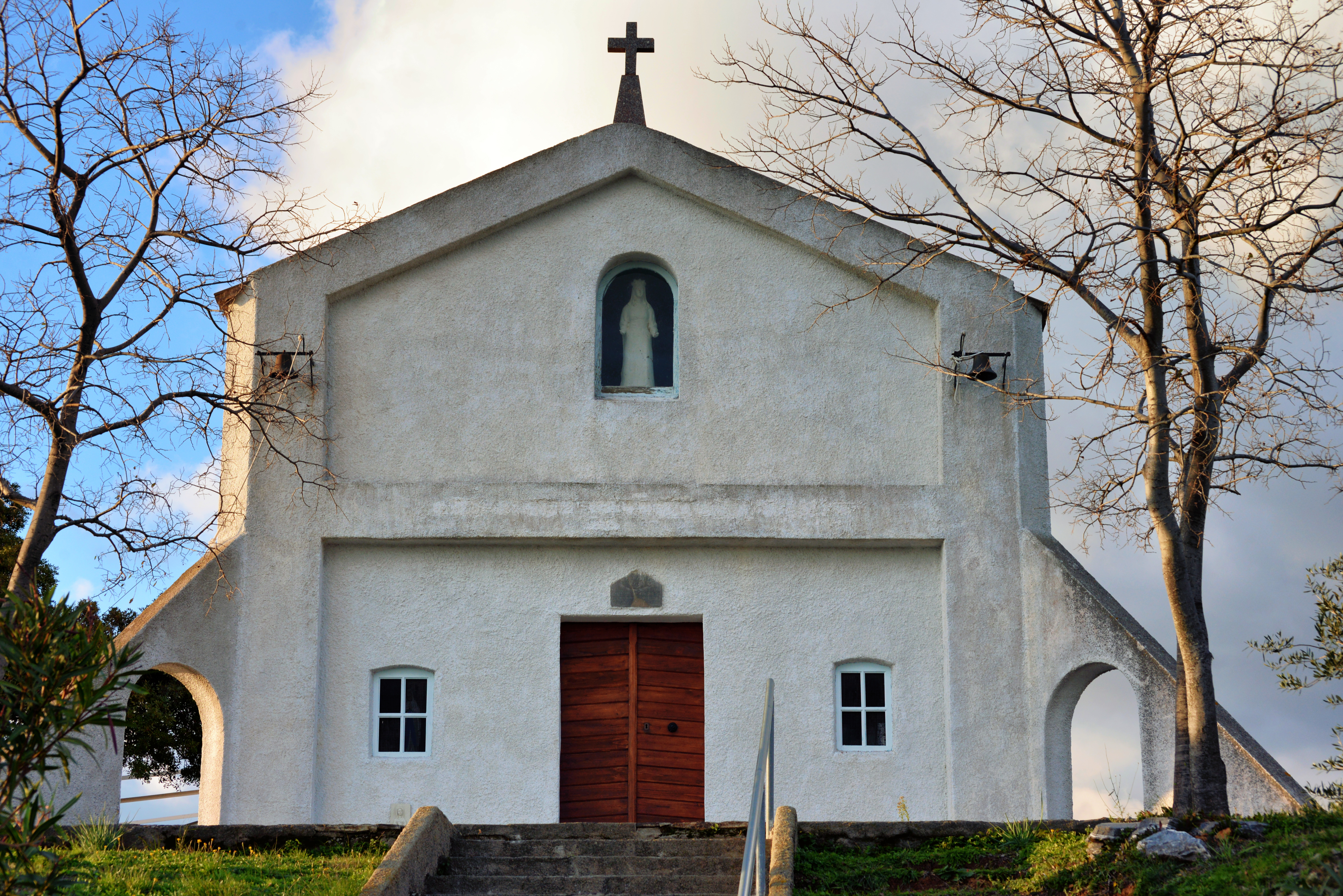 Tox, Castagniccia (Corse) - Chapelle Notre-Dame-des-Grâces (a Madonna delle Grazie)